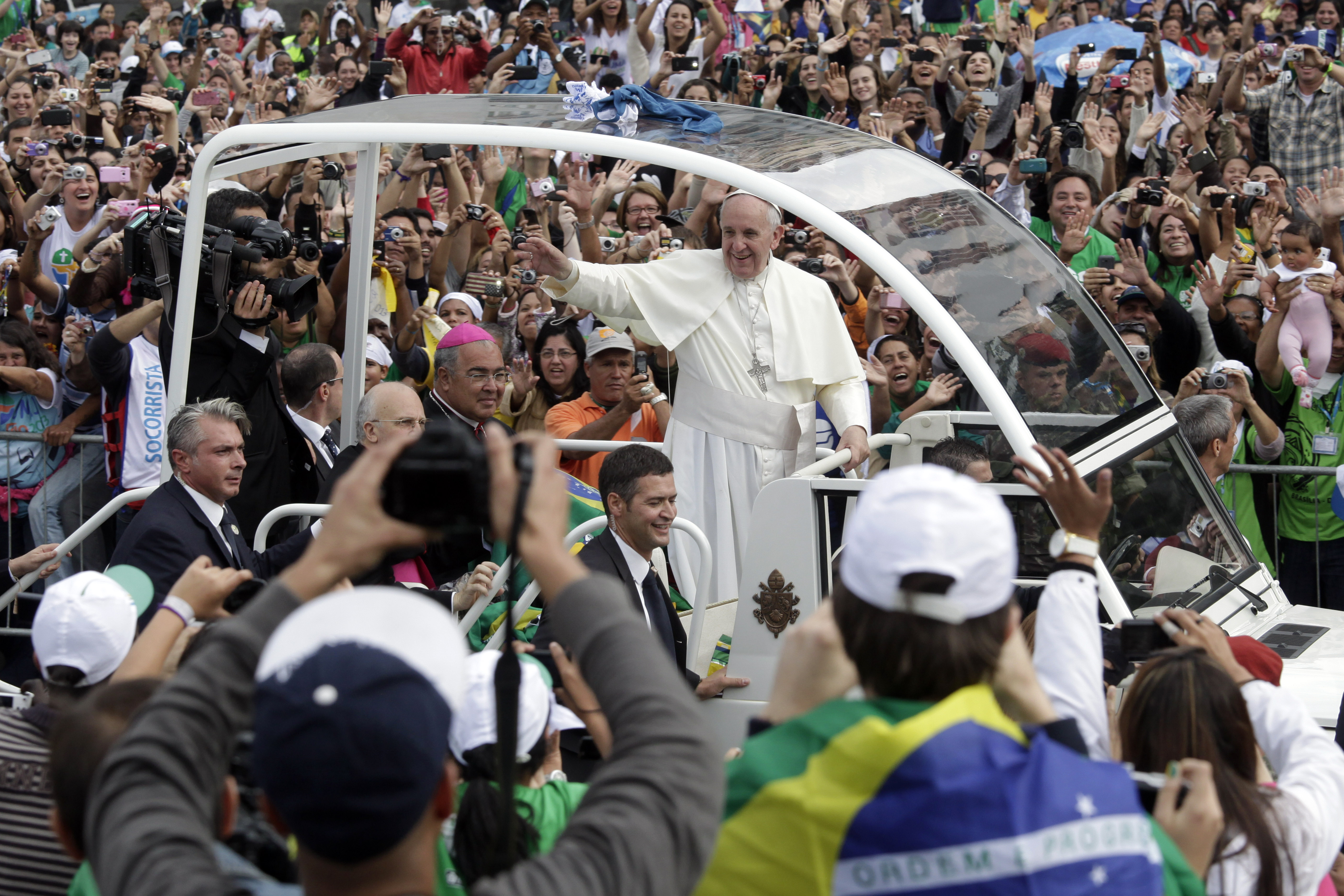 Foto: Felipe Barra